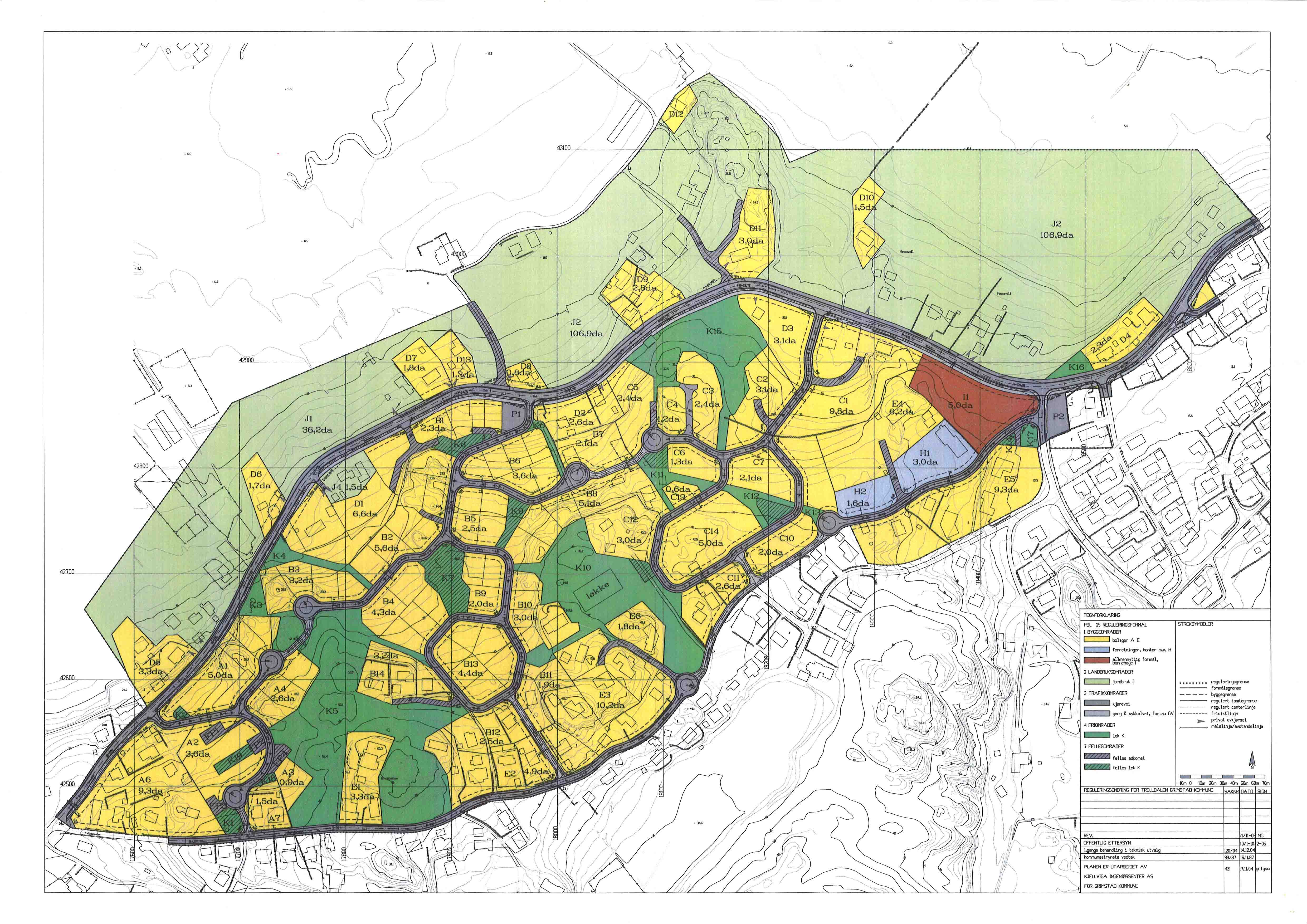 Reguleringsplan for "Trolldalen", Grimstad.